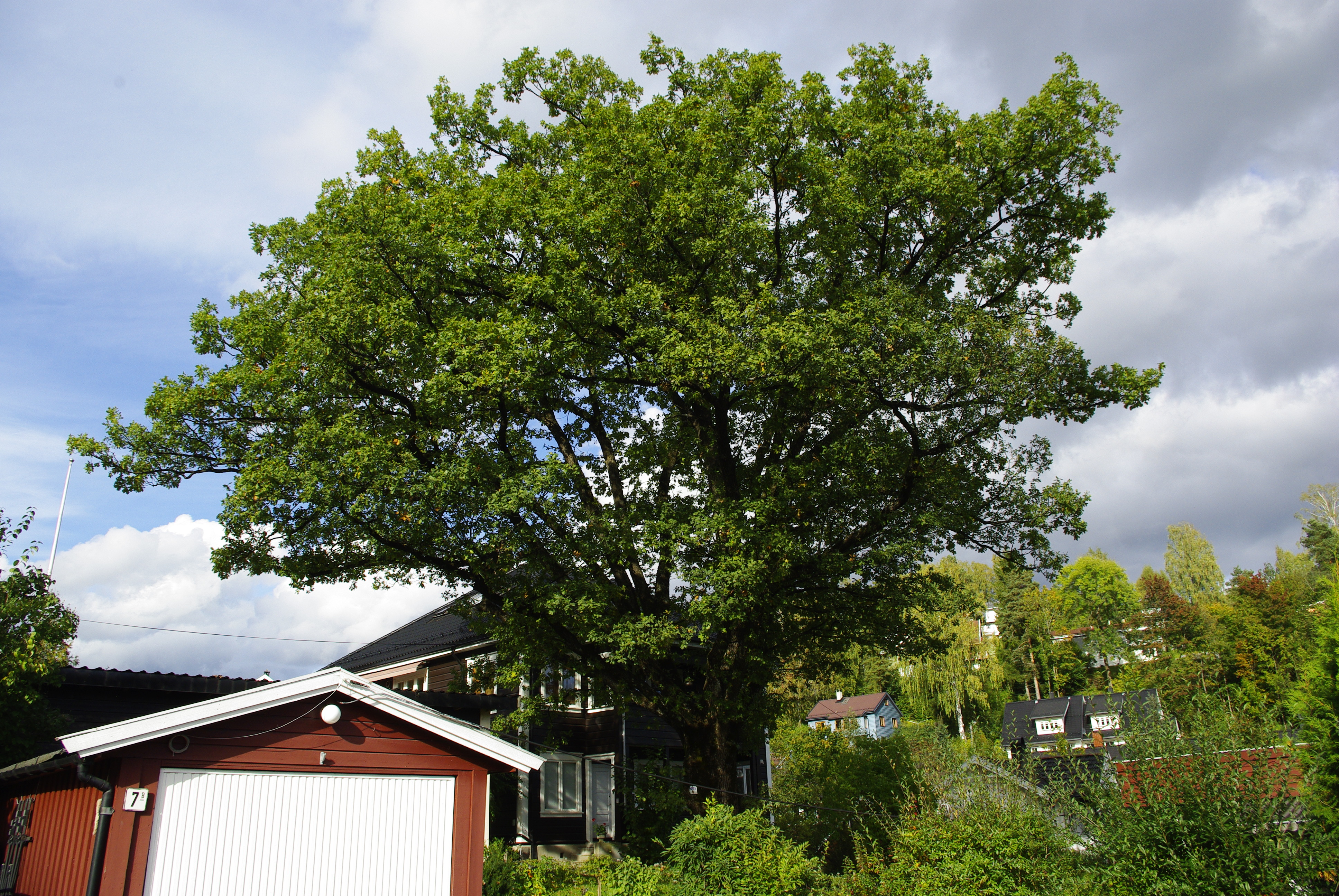 Trekrona på den fredede eika